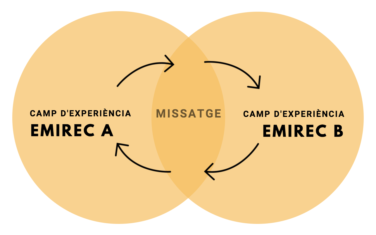 Esquema que resumeix l'efecte de sintonització entre els dos EMIRECS.